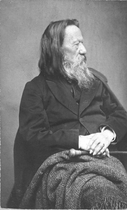 Der oberösterreichische Mundartdichter Franz Stelzhamer im Alter von 68 Jahren